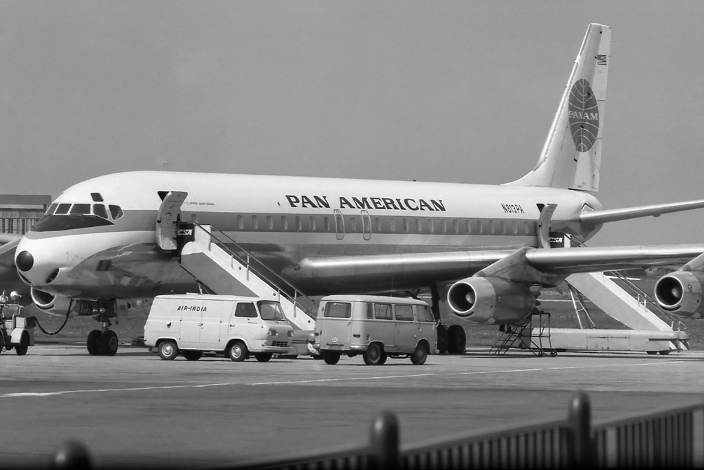 Letadlo c/n 45266, l/n 100 bylo 13.10.1960 a dodáno k Pan American World Airways a pojmenováno „Bostonian“. Od 31.12.1968 bylo pronajato k Air Congo (od 25.10.1971 Air Zaire), které jej 10.06.1969 zakoupilo a dostalo registraci 9Q-CLE. V listopadu 1984 vyřazeno z provozu, uloženo v Kinshase a tamtéž v dubnu 1987 rozebráno.